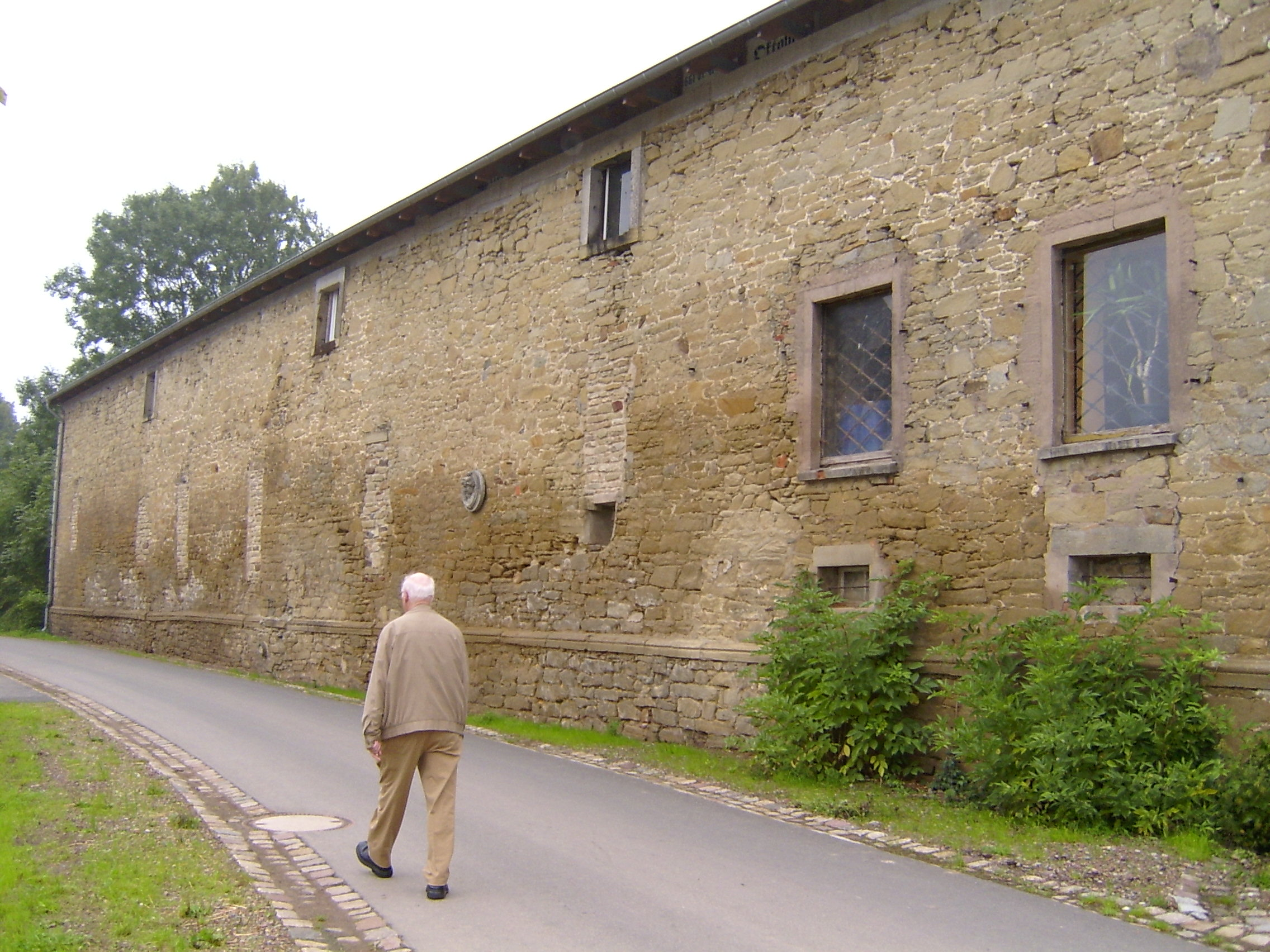 Ostansicht des Gebäudes Guylord 21.08.2005